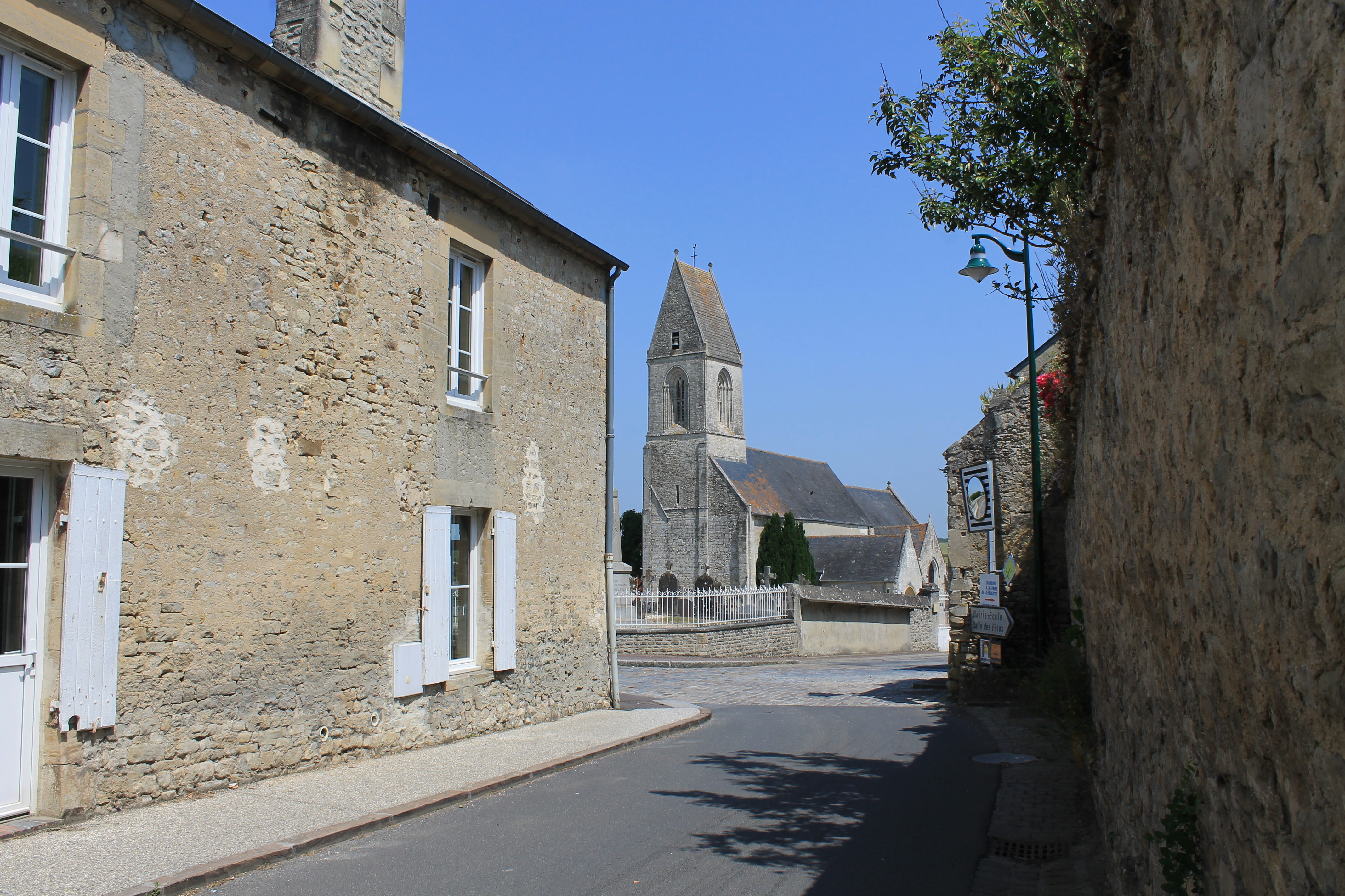 Rue du village et église Saint-Martin de Nonant (Calvados)